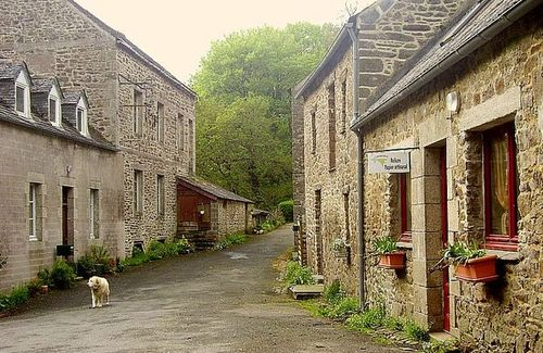 Le moulin de Kéréon, situé sur la rivière Penzé commune de Saint-Sauveur/Finistère/France